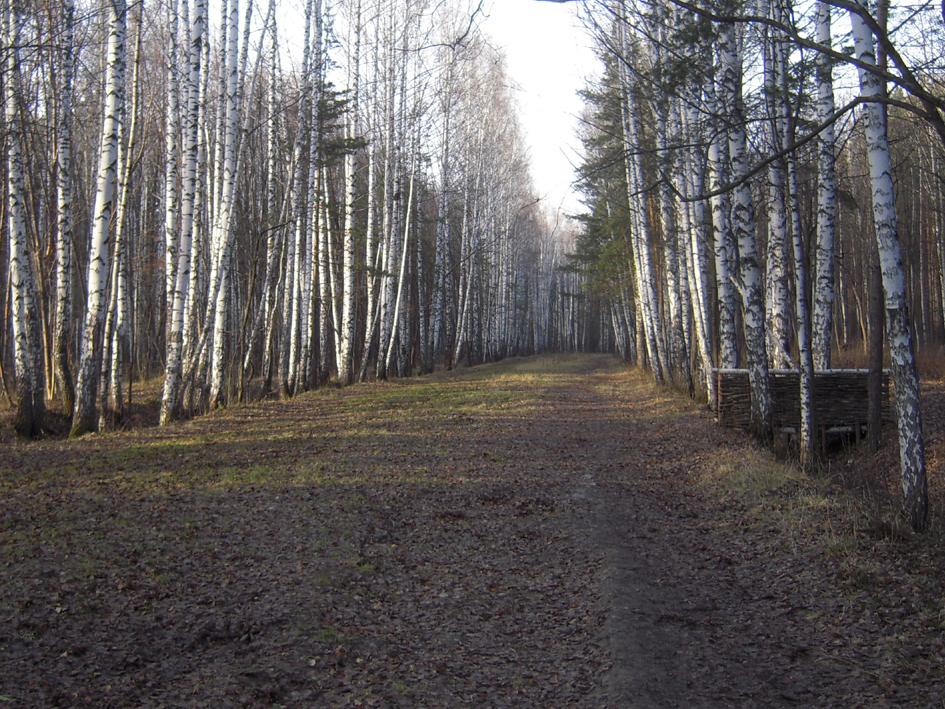 Танкодром завода Уралмаш Северная петля